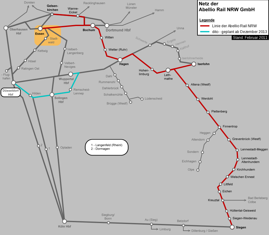 Netz der Abellio Rail NRW GmbH (ab 12/2013)